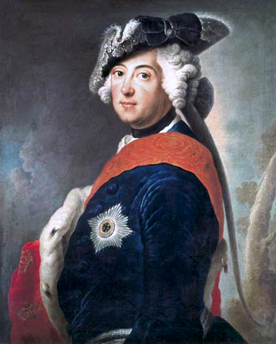 Chef Portträt du roi II de Prusse (1712—1786) avec le tricorne en tant que commandant, Berlin / Potsdam, Fondation des châteaux et jardins prussiens